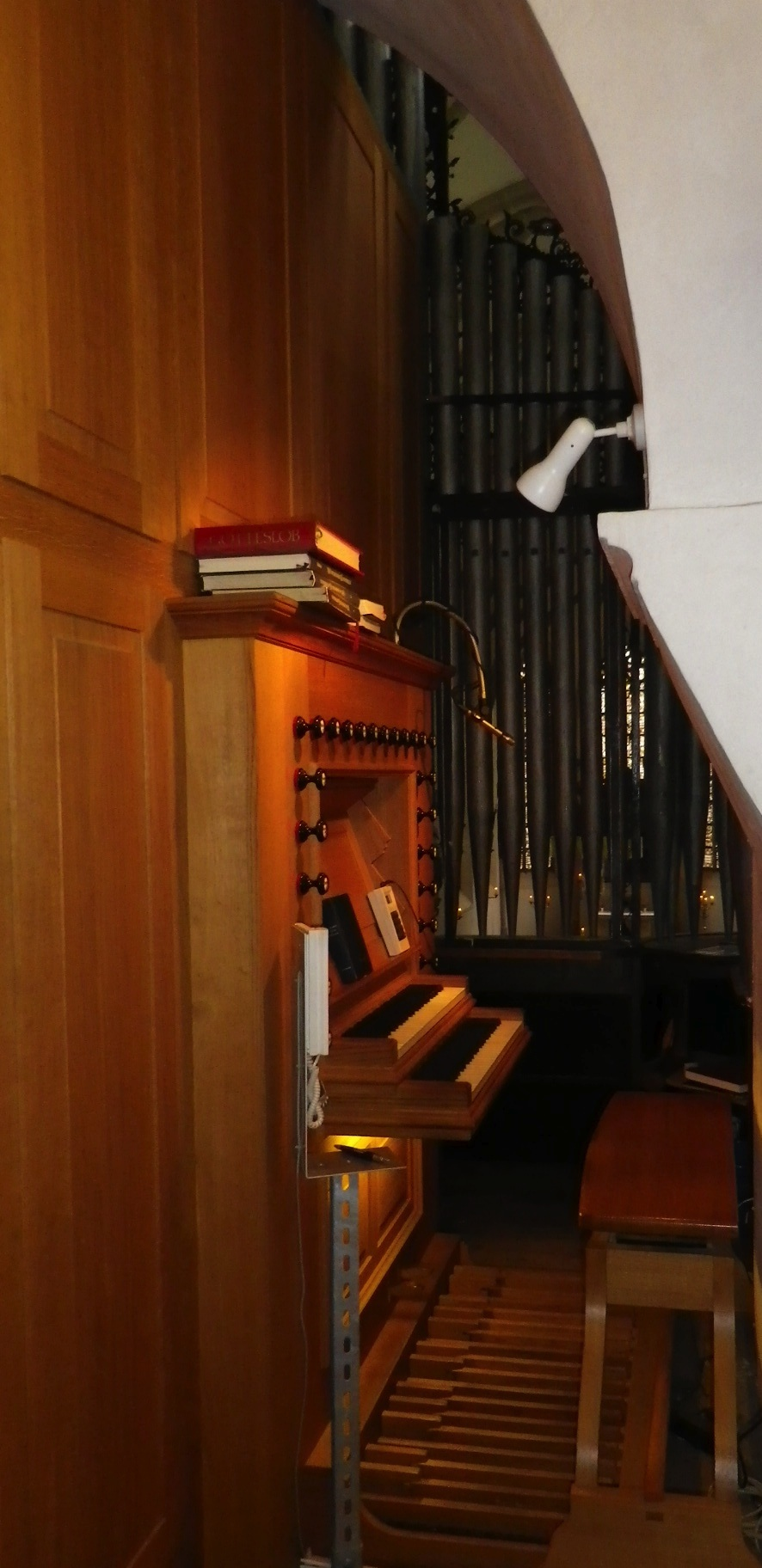 Spielanlage, Orgel St. Mauritz, Münster